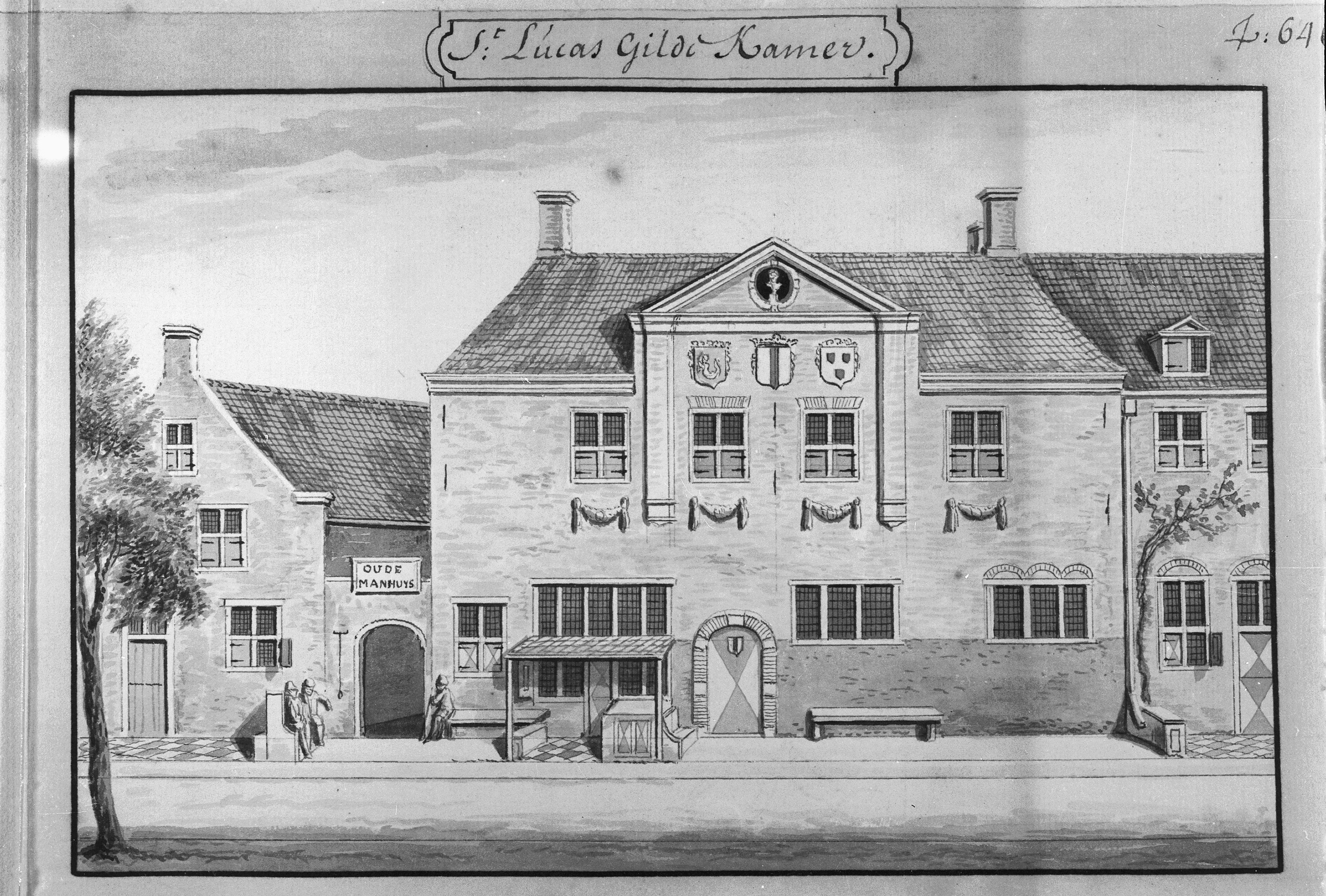 Diversen: St.Lucas Gildekamer, door A.Rademaker